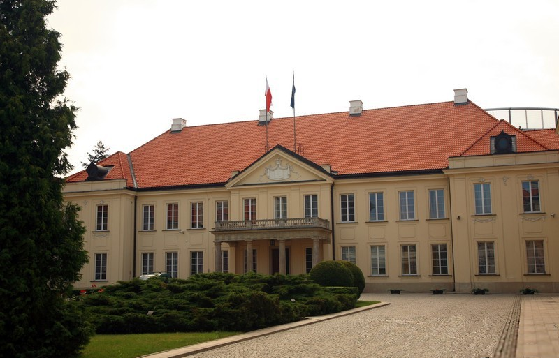 Warszawa (Polska)